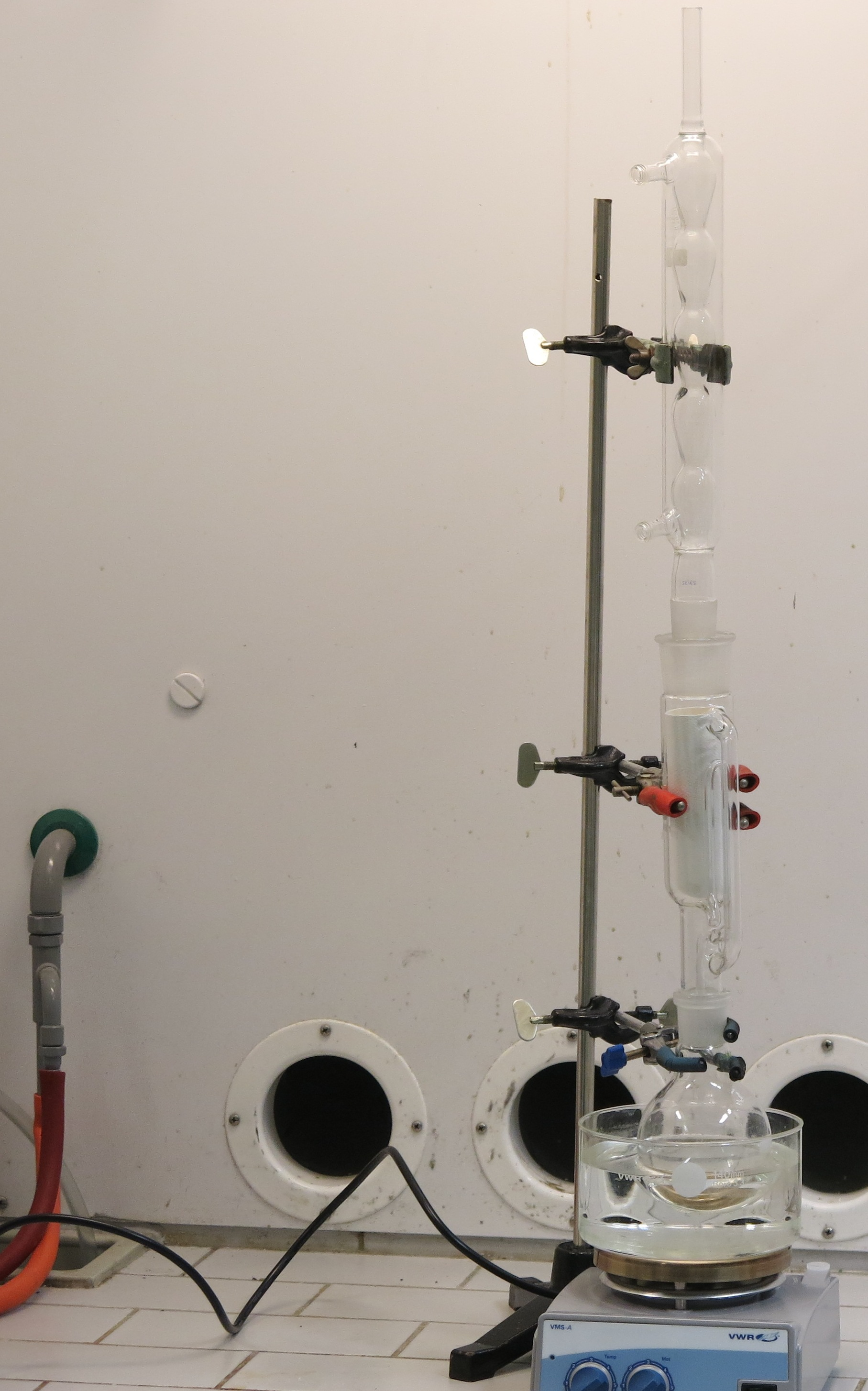 Yksinkertainen Soxhlet-laitteisto